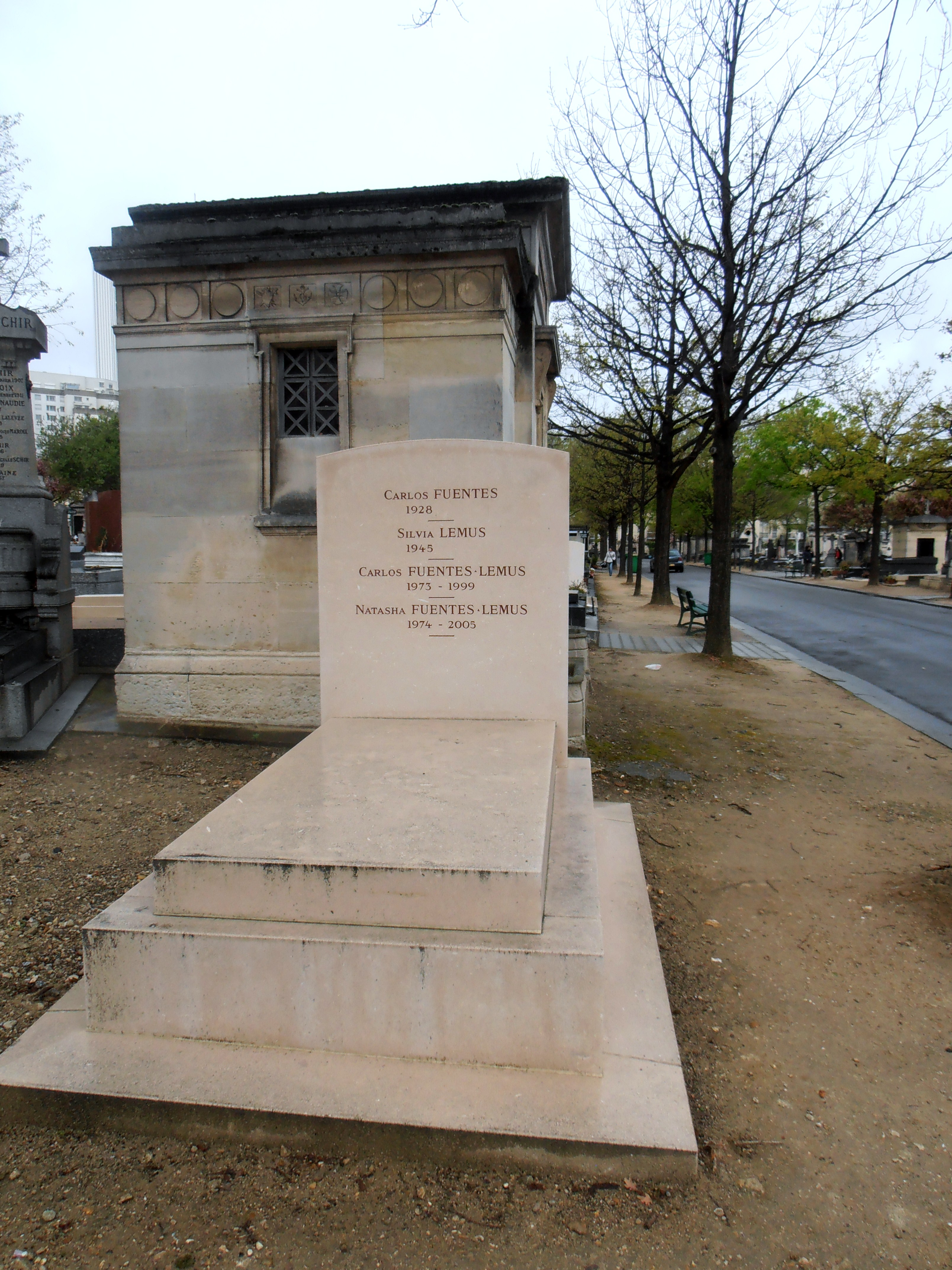 Foto tomada en 10 de abril de 2012. Poco más de un mes después falleció Carlos Fuentes. Hoy, 16 de septiembre de 2012, su viuda ha anunciado que las cenizas del escritor reposarán aquí.